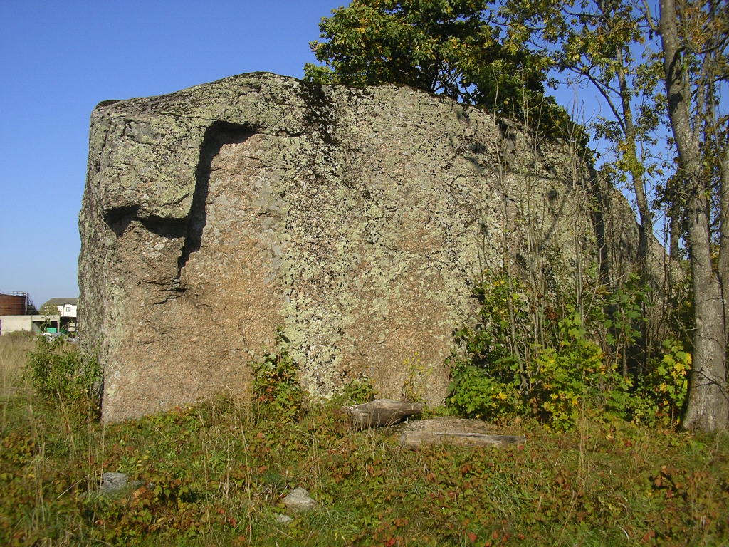 Aruküla hiidrändrahn